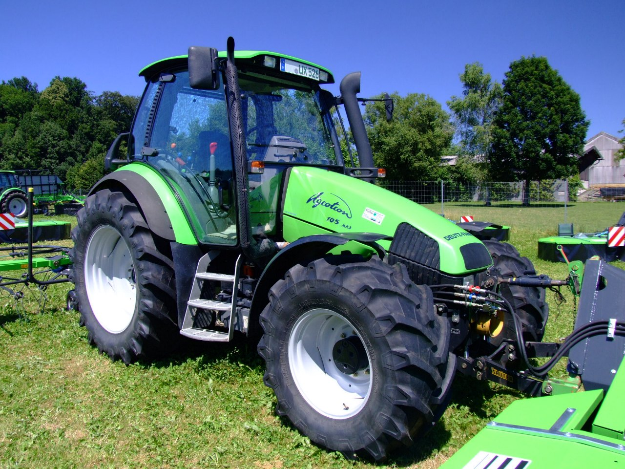 Deutz-Fahr Agrotron 105 MK3